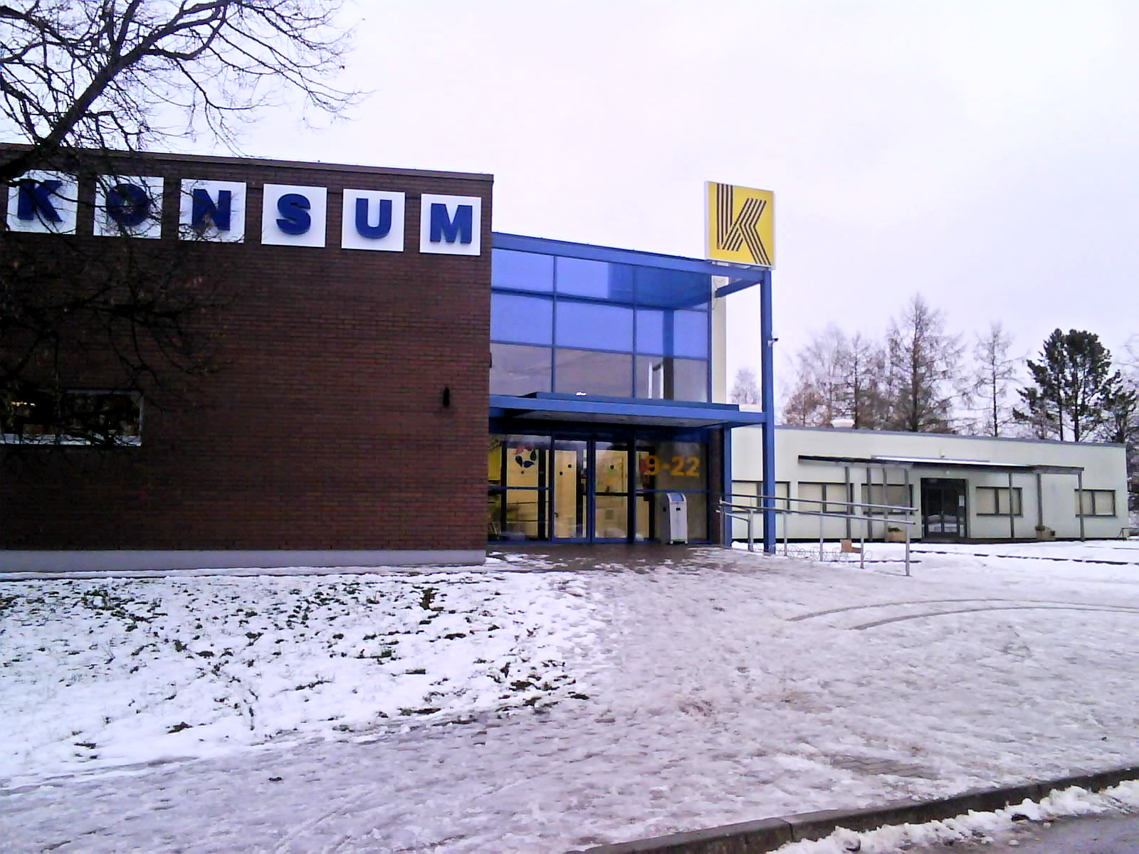 Raasiku